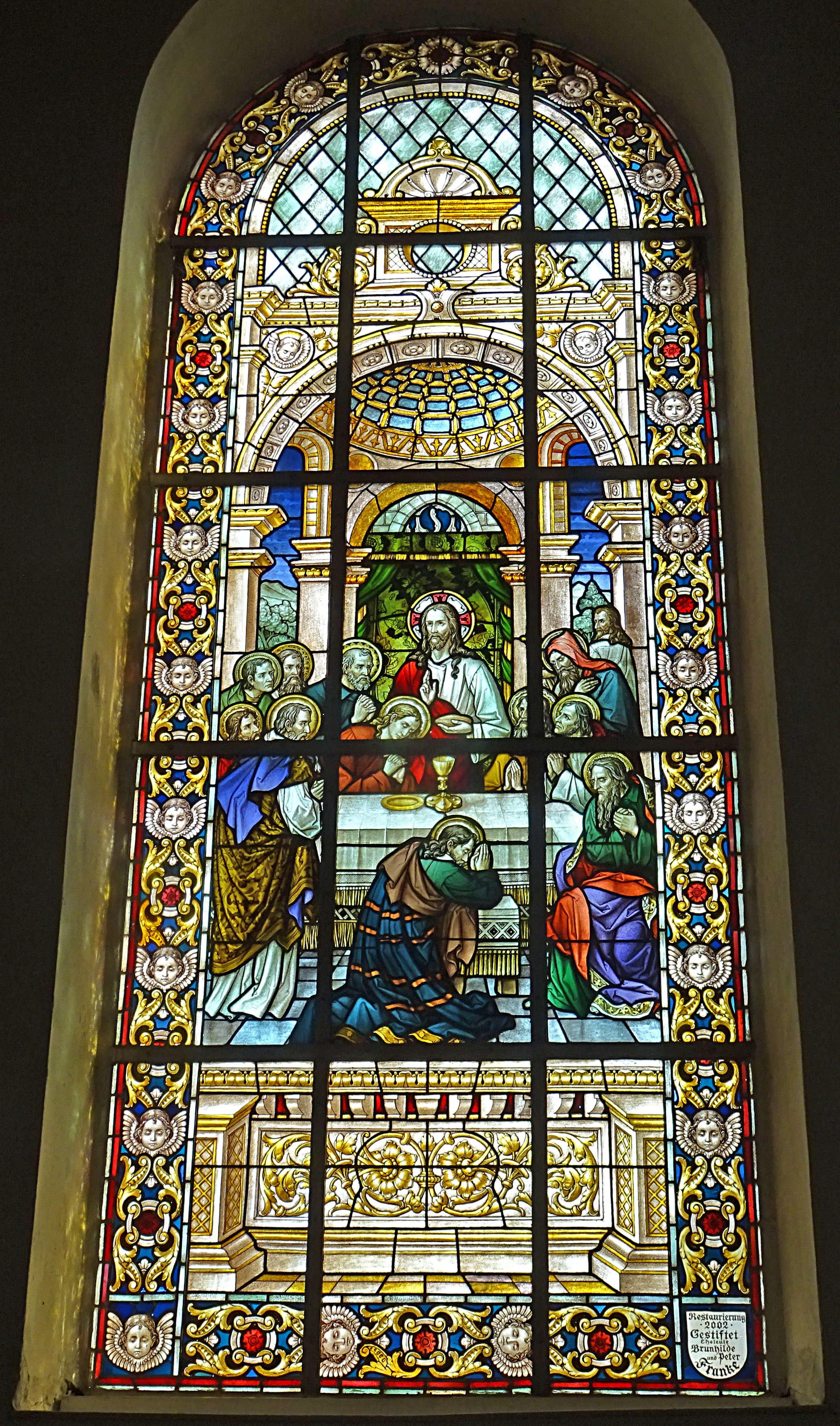 Buntglasfenster in der Dorfkirche St. Bartholomäus (Hohengandern)